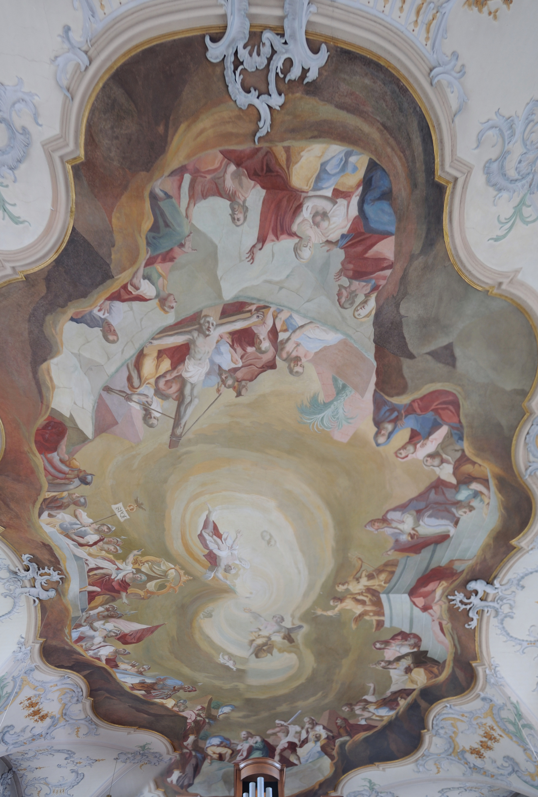 Rheinfelden-Minseln: Deckenfresko